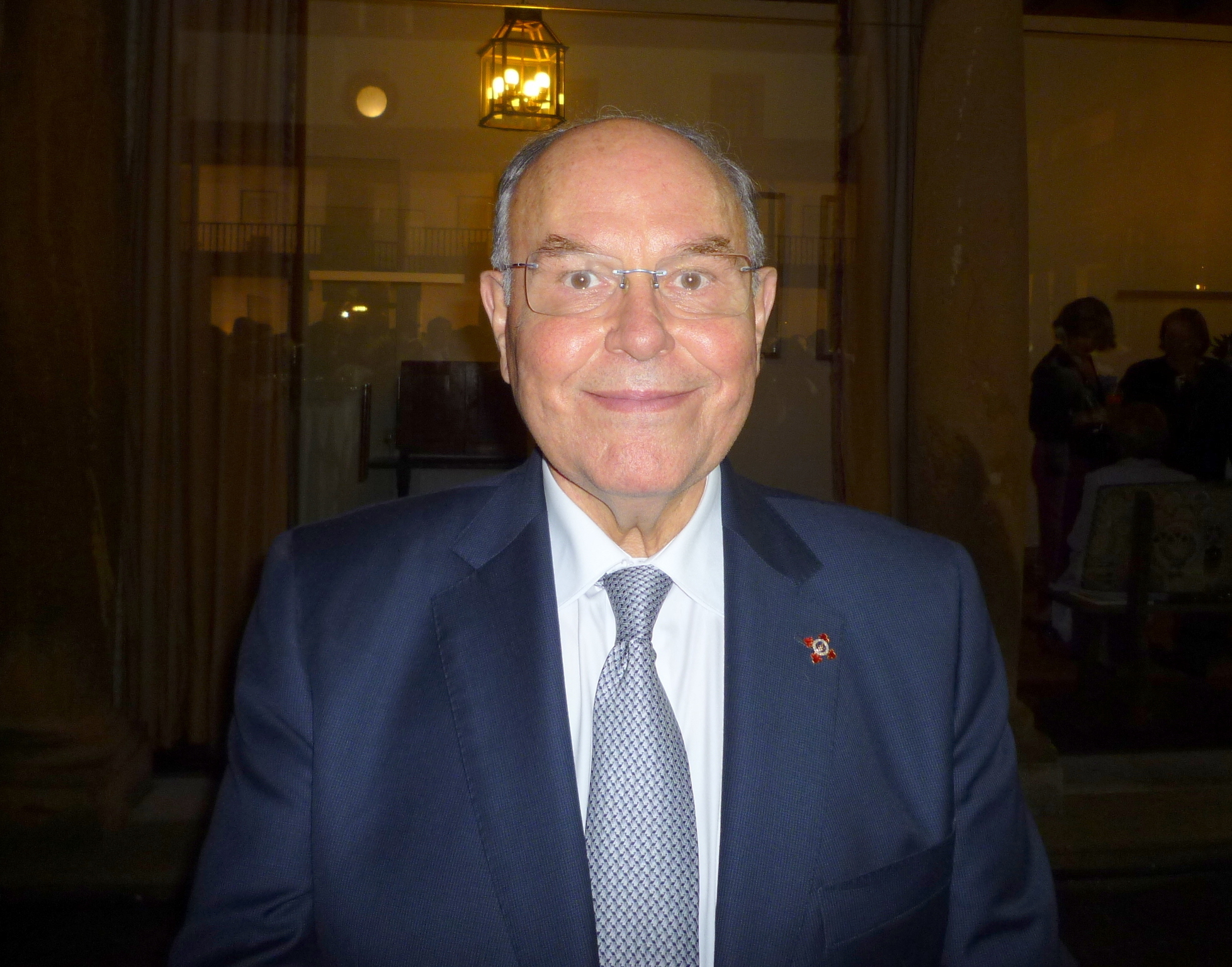 César Nombela en la recepción tras la entrega de los Premios Princesa de Asturias 2015. 23 octubre de 2015, patio del Hotel de la Reconquista, Oviedo.